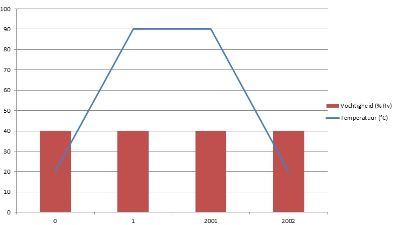 Mogelijke testcyclus met klimaatsimulatie. "Hoog temperatuur, constant vocht"